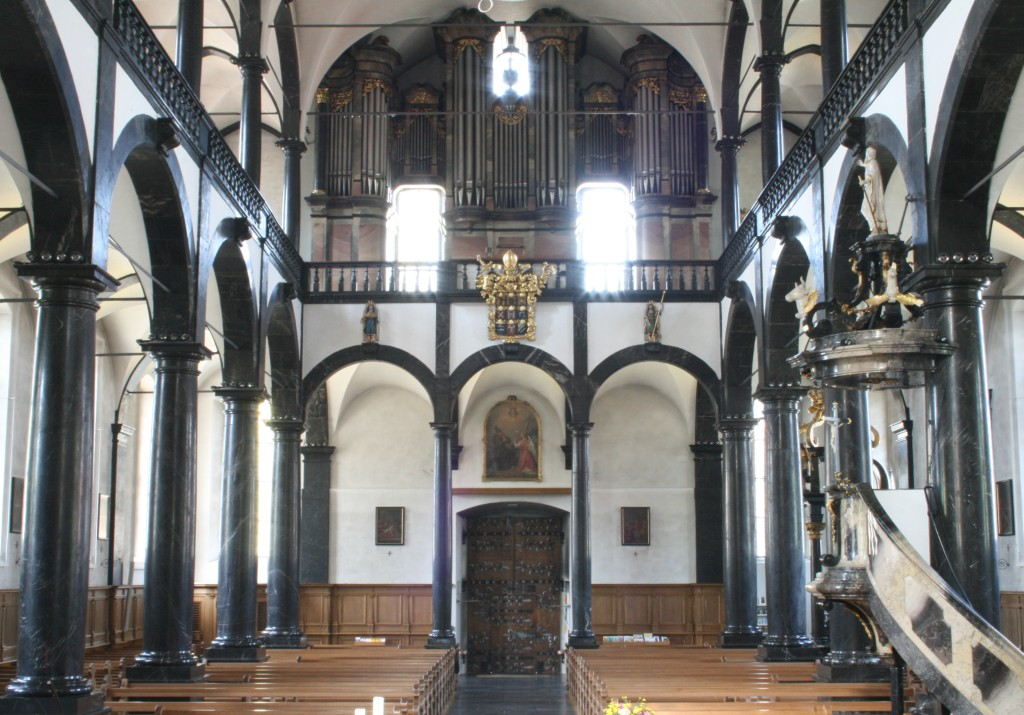 Pfarr- und Wallfahrtskirche Sachseln, Schweiz, hintere Emore mit Orgel, rechts die KAnzel